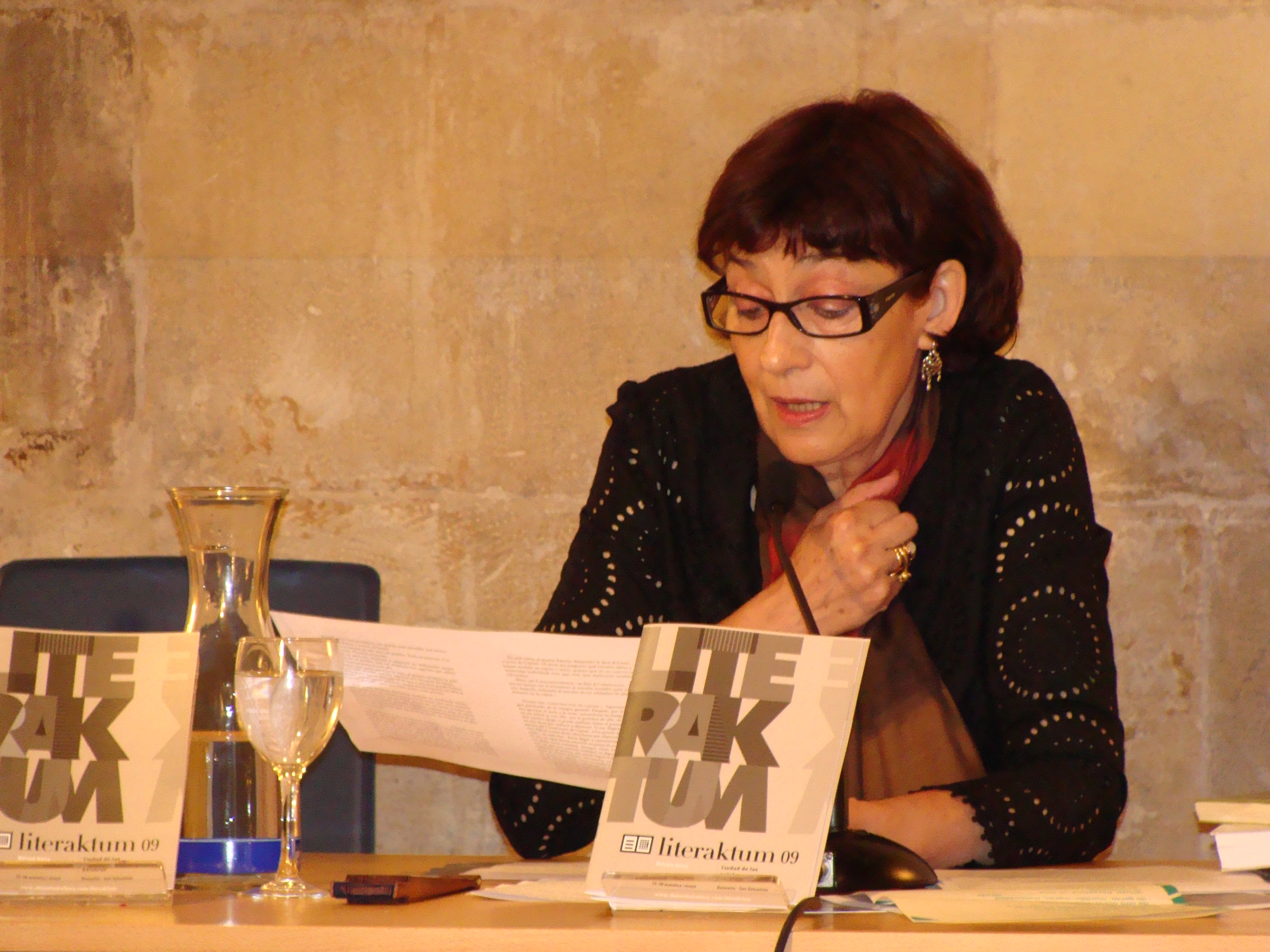 OLVIDO GARCIA VALDES 005